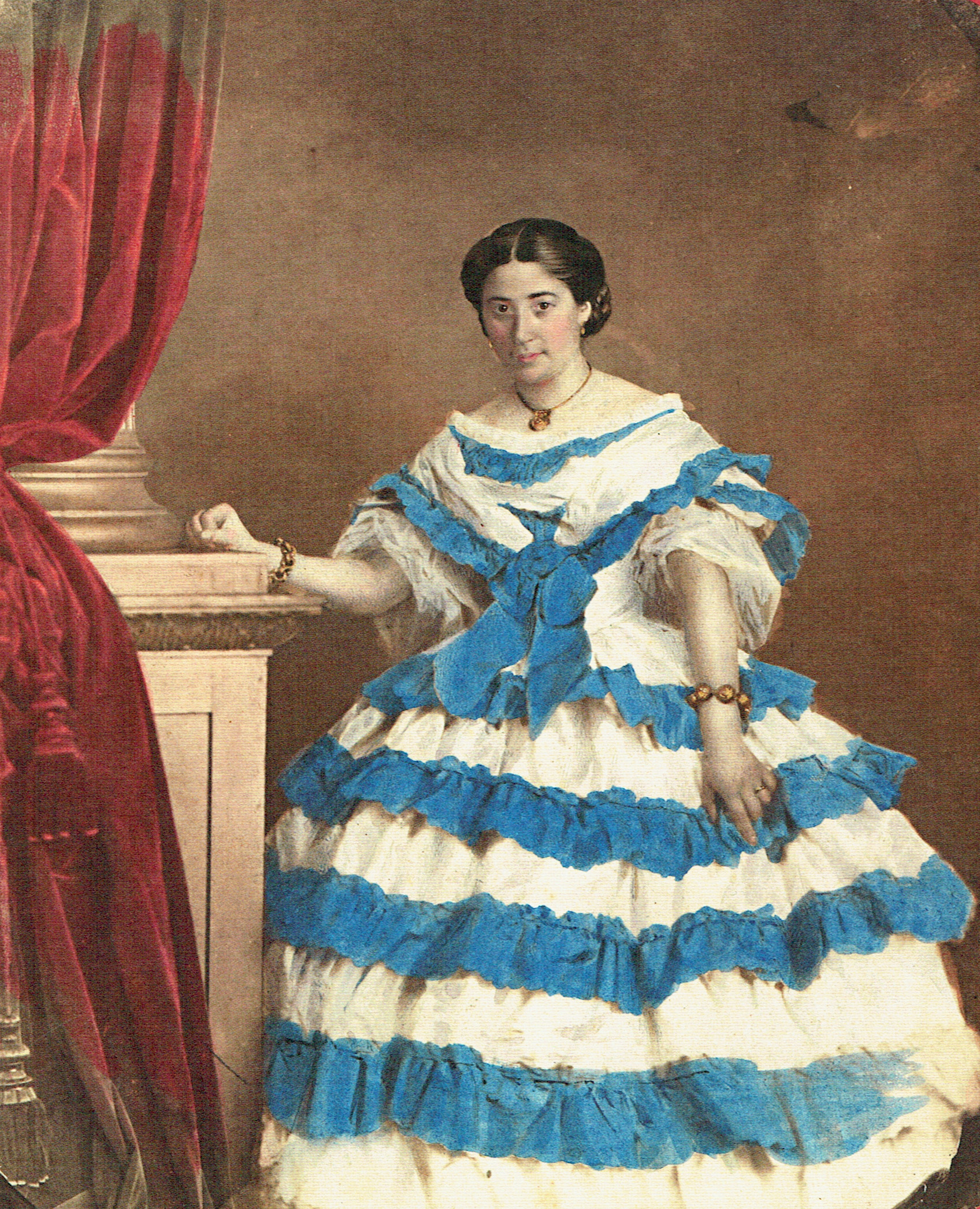 Euphrosyne Abrahamson (1836-1869)